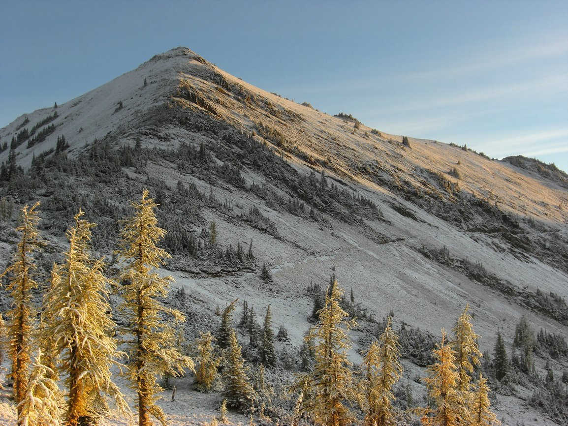 20100924.502 Okanogan Nat. Forest, WA